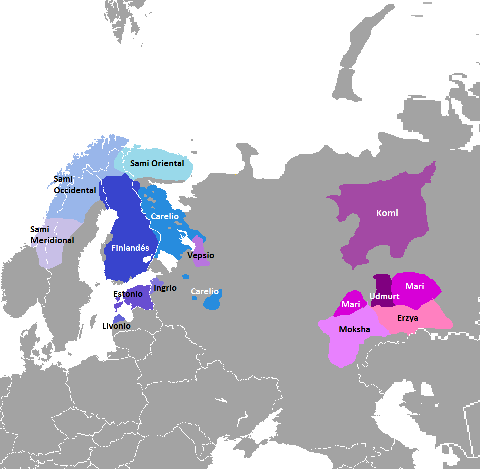 Lenguas finopérmicas